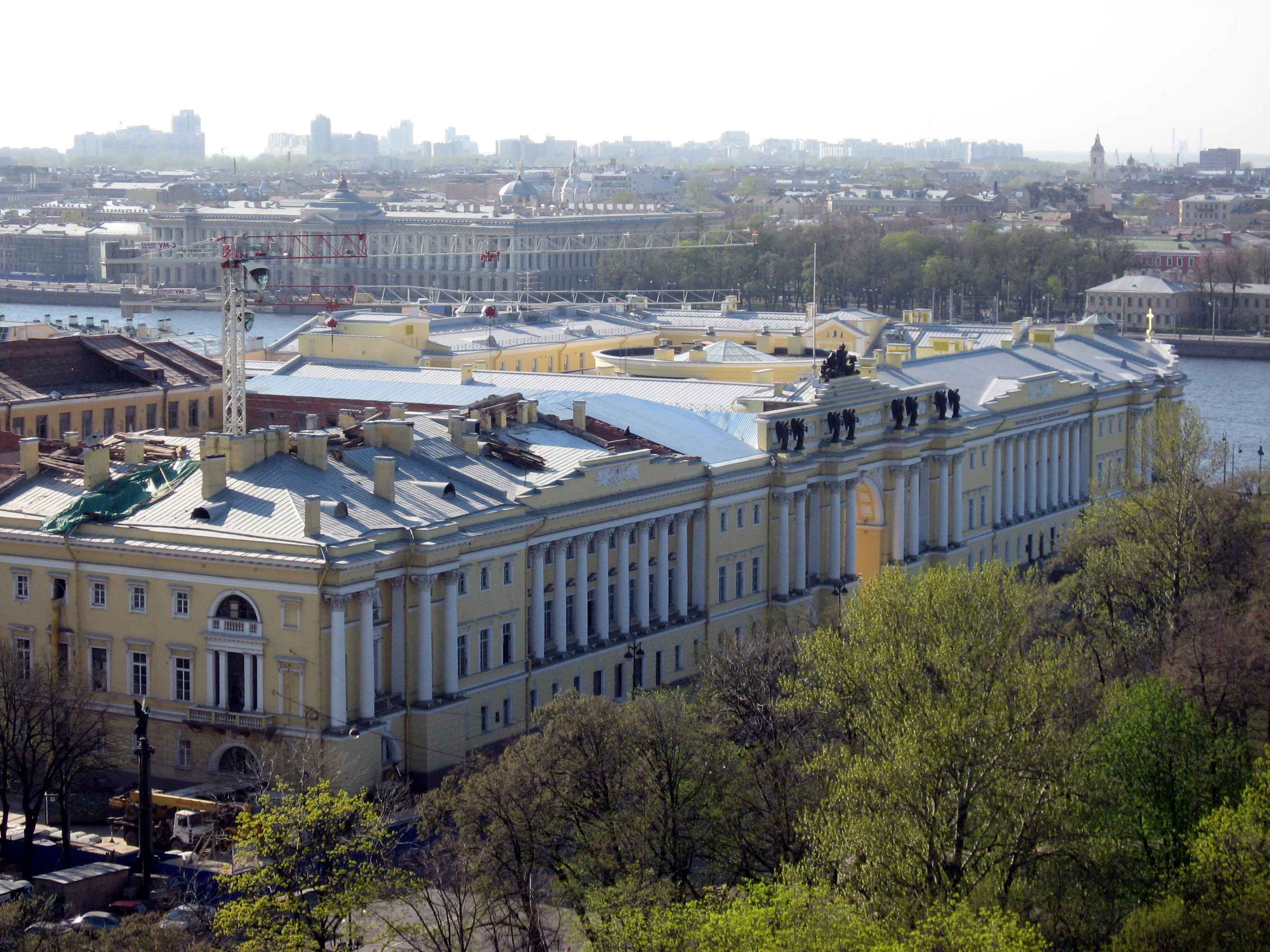 Sankt-Petěrburg, výhled z Katedrály svatého Izáka